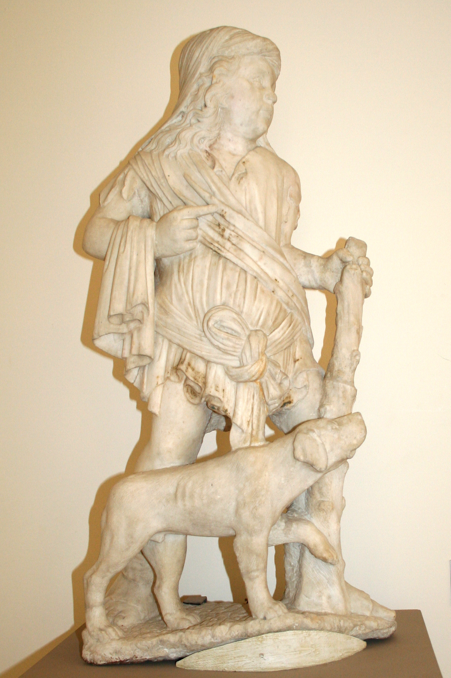 ArtistUnknownTitleEnfant accompagné d'un chienDate16th centuryMediummarbleCurrent location musée Calvet Native nameMusée CalvetLocationAvignonCoordinates43° 34′ 12″ N, 4° 29′ 24.36″ E Established9 April 1811Web pagemusee-calvet.orgAuthority control : Q1142988 GND: 1218592-9 Museofile: M0946 Accession numberN 91 CSource/PhotographerOwn workPermission (Reusing this file) This is a faithful photographic reproduction of a two-dimensional, public domain work of art. The work of art itself is in the public domain for the following reason: This work is in the public domain in its country of origin and other countries and areas where the copyright term is the author's life plus 100 years or less. You must also include a United States public domain tag to indicate why this work is in the public domain in the United States. This file has been identified as being free of known restrictions under copyright law, including all related and neighboring rights. The official position taken by the Wikimedia Foundation is that "faithful reproductions of two-dimensional public domain works of art are public domain". This photographic reproduction is therefore also considered to be in the public domain in the United States. In other jurisdictions, re-use of this content may be restricted; see Reuse of PD-Art photographs for details.